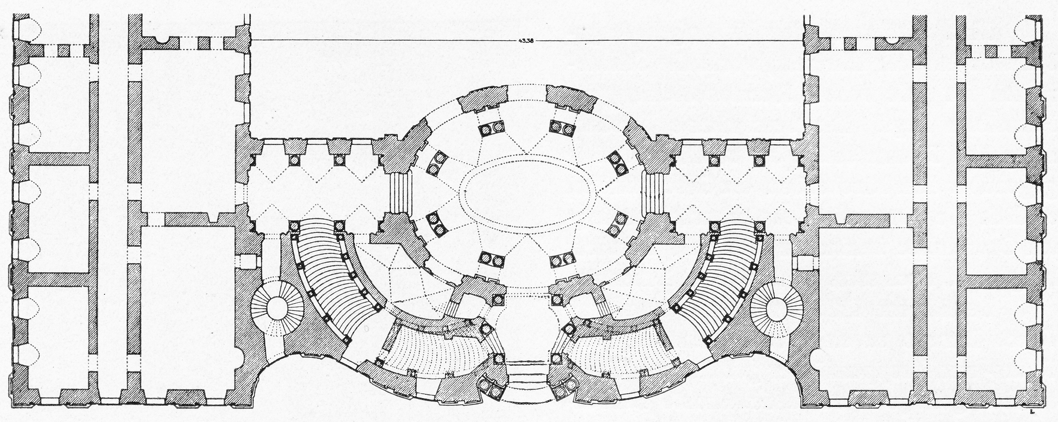 Guarino Guarini: Palazzo Carignano, Turin, 1679. Grundriss.